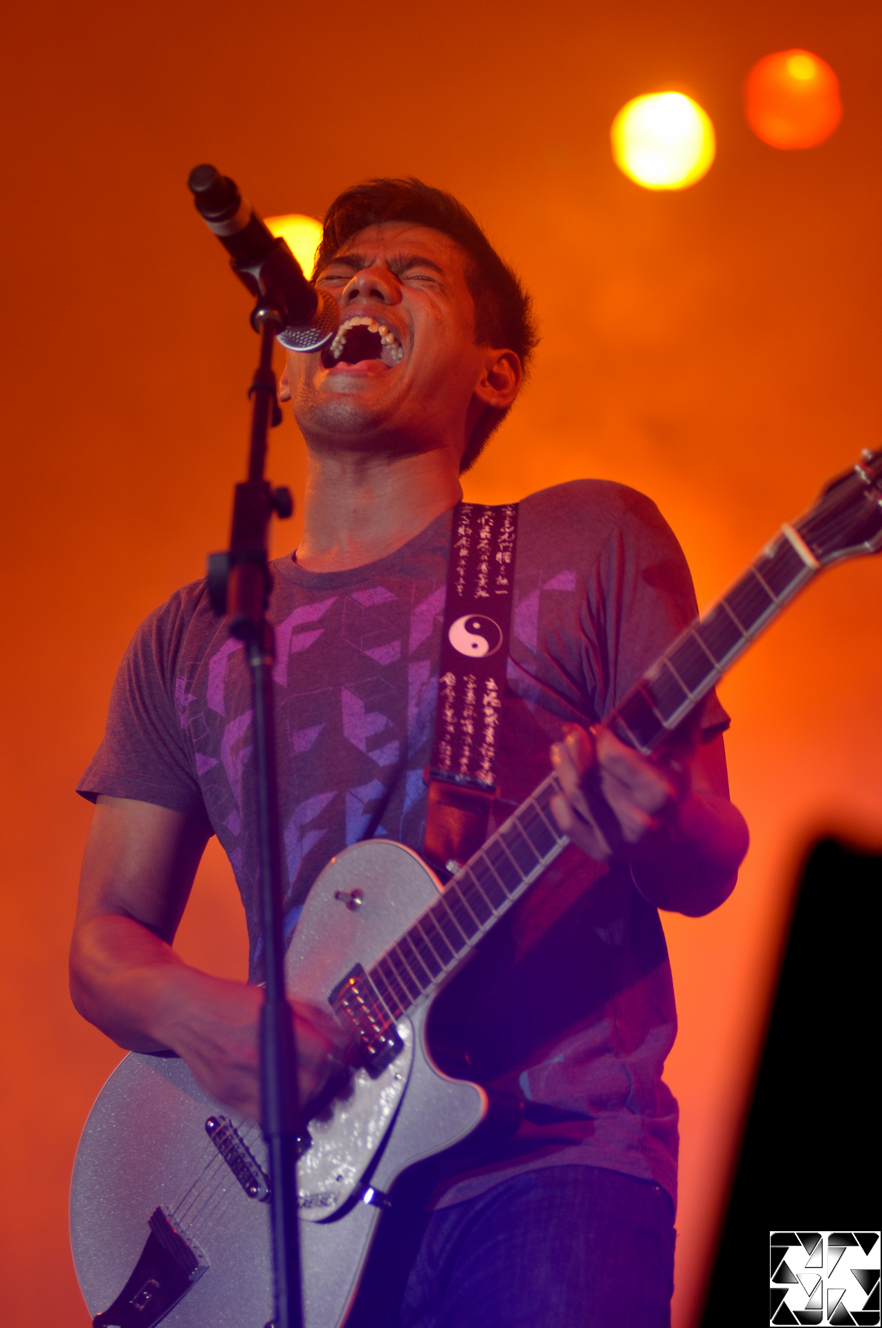 Azlan & The Typewriter di Konsert Twisties Bingit 2010